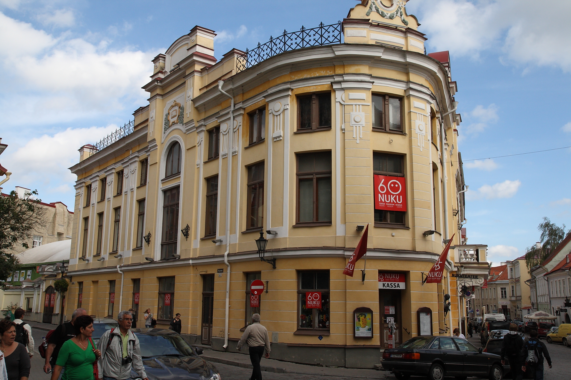 Maja, kus 1809-1902 tegutses esimene kutseline teater Tallinnas